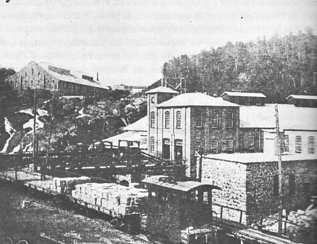 Pulperie de Chicoutimi durant ses années d'activités